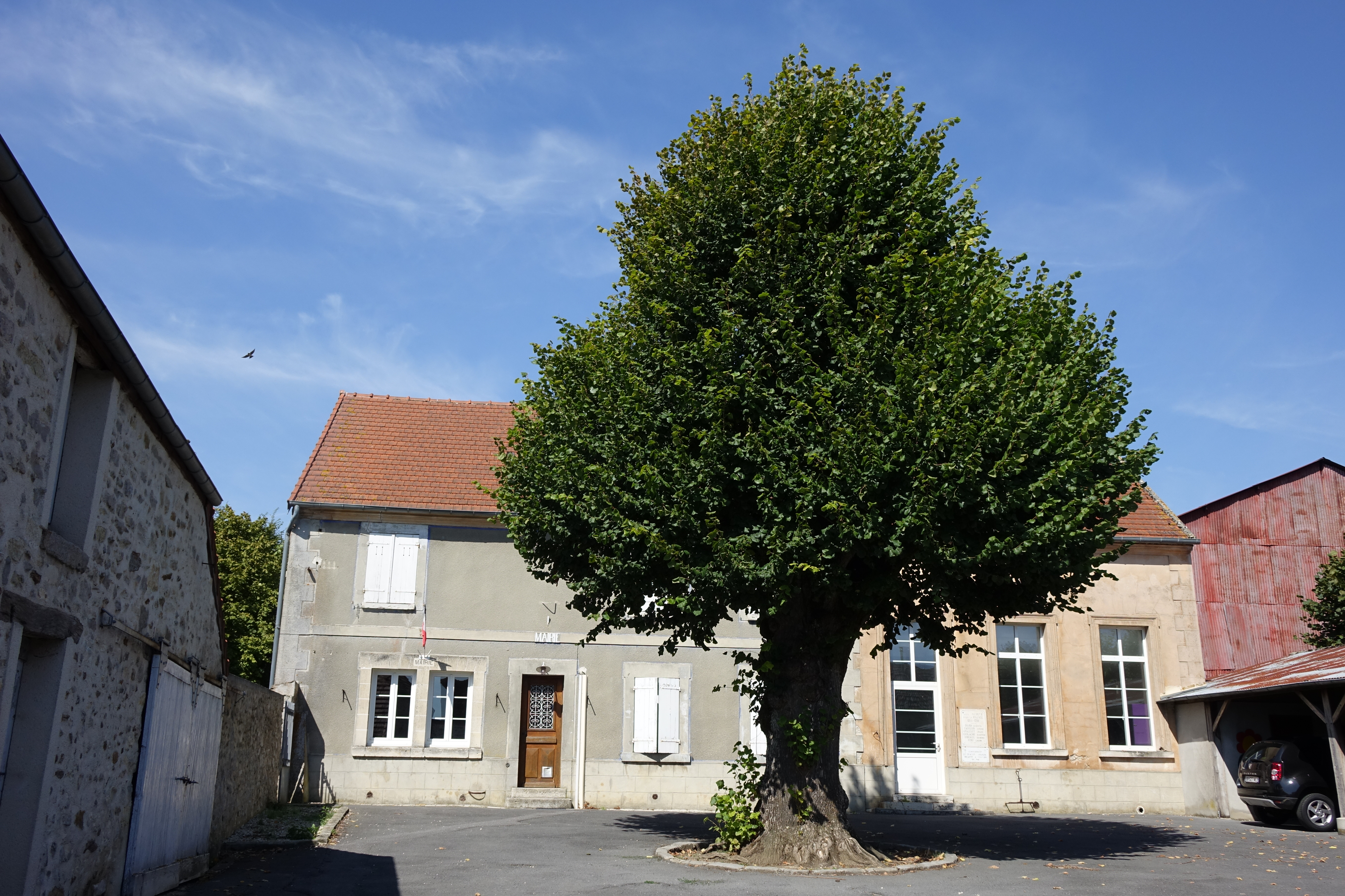 Mairie de Courmont, Aisne, France